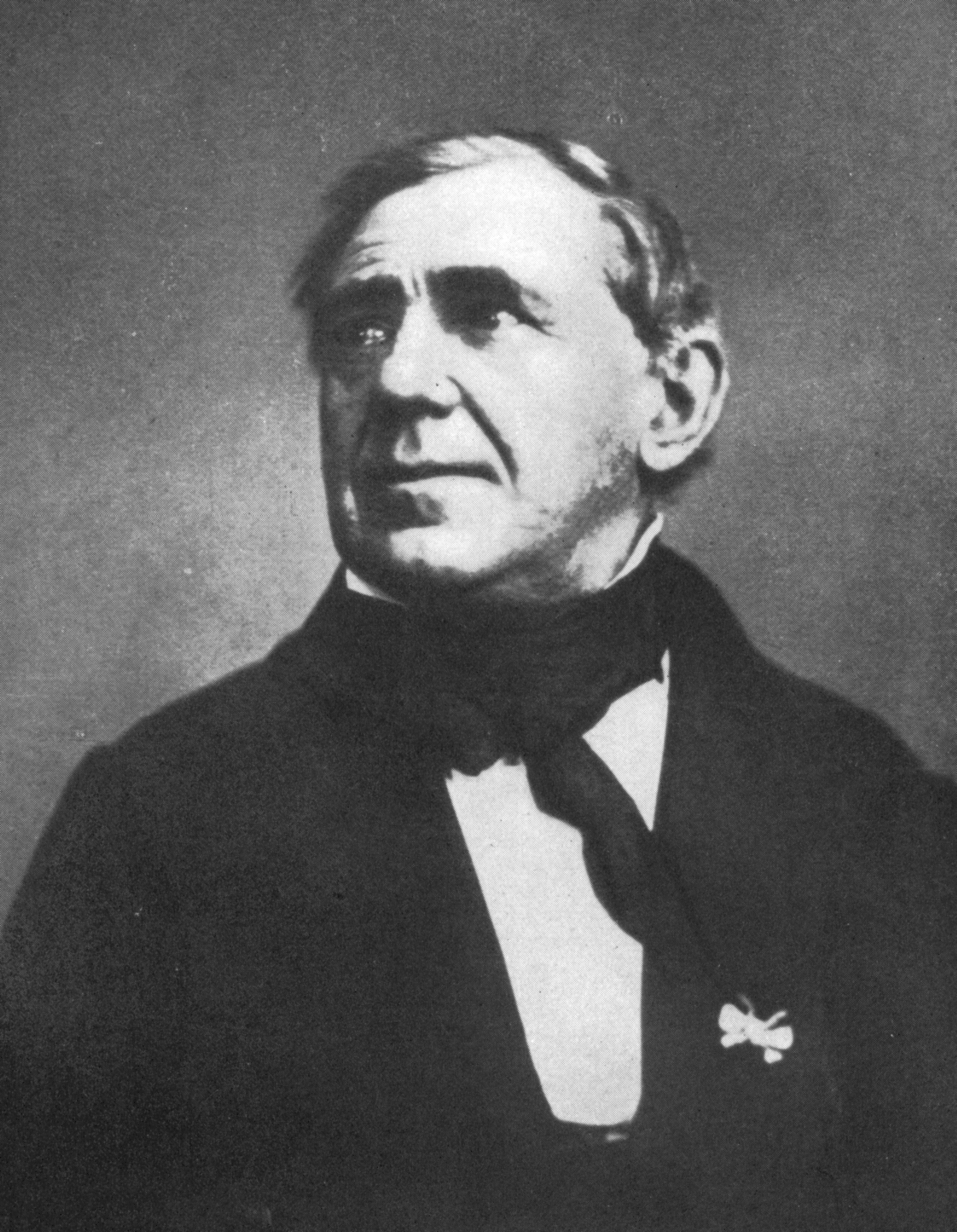 Foto des Geheimen Baurats G. Linke